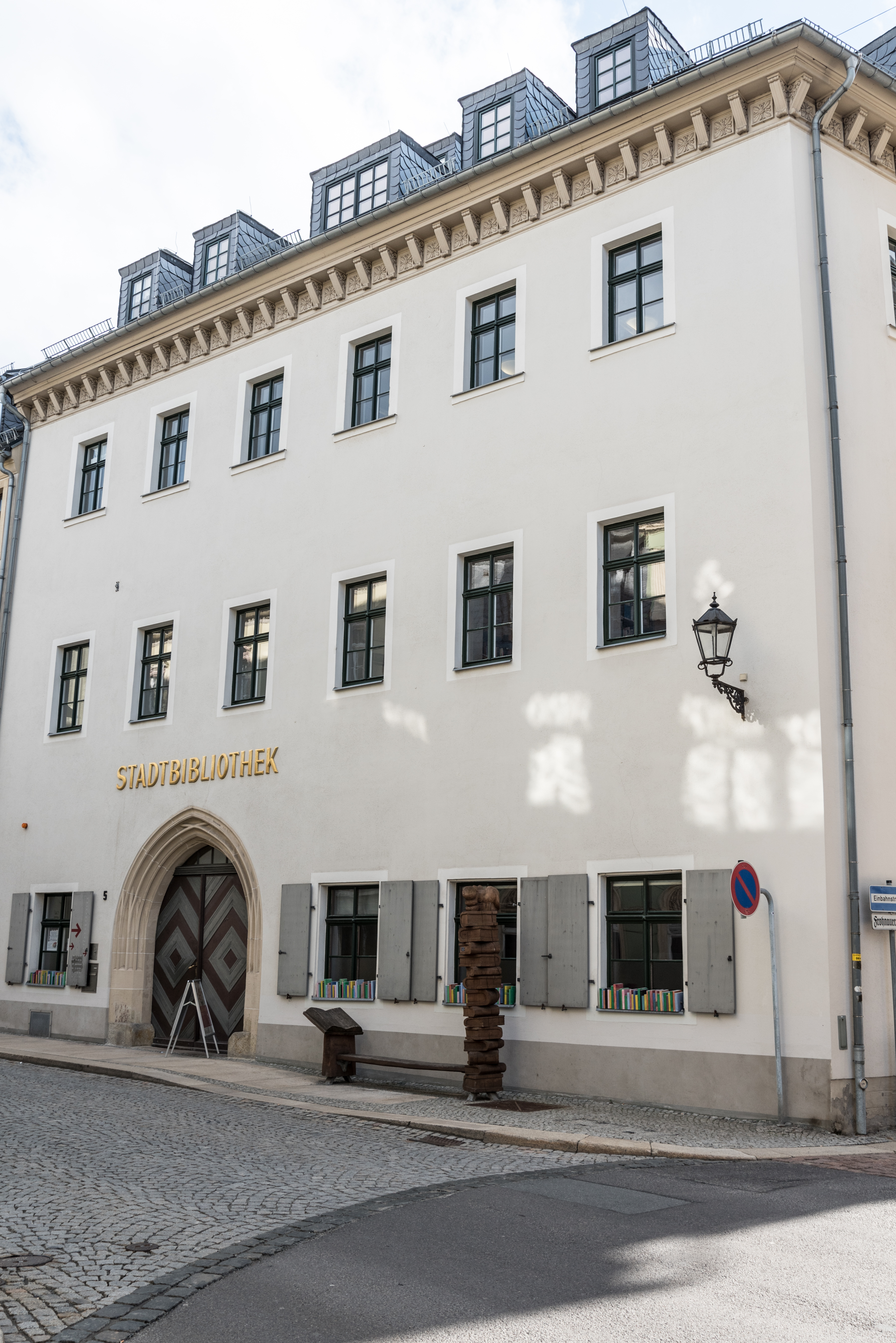 Annaberg, Klosterstraße 5